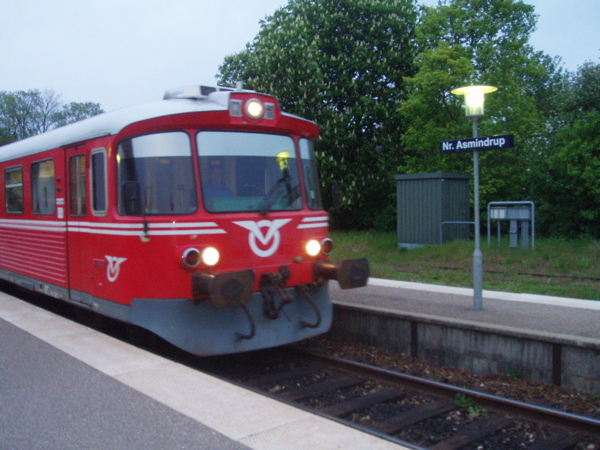 Togstamme fra 1960'erne på Odsherreds Jernbane.